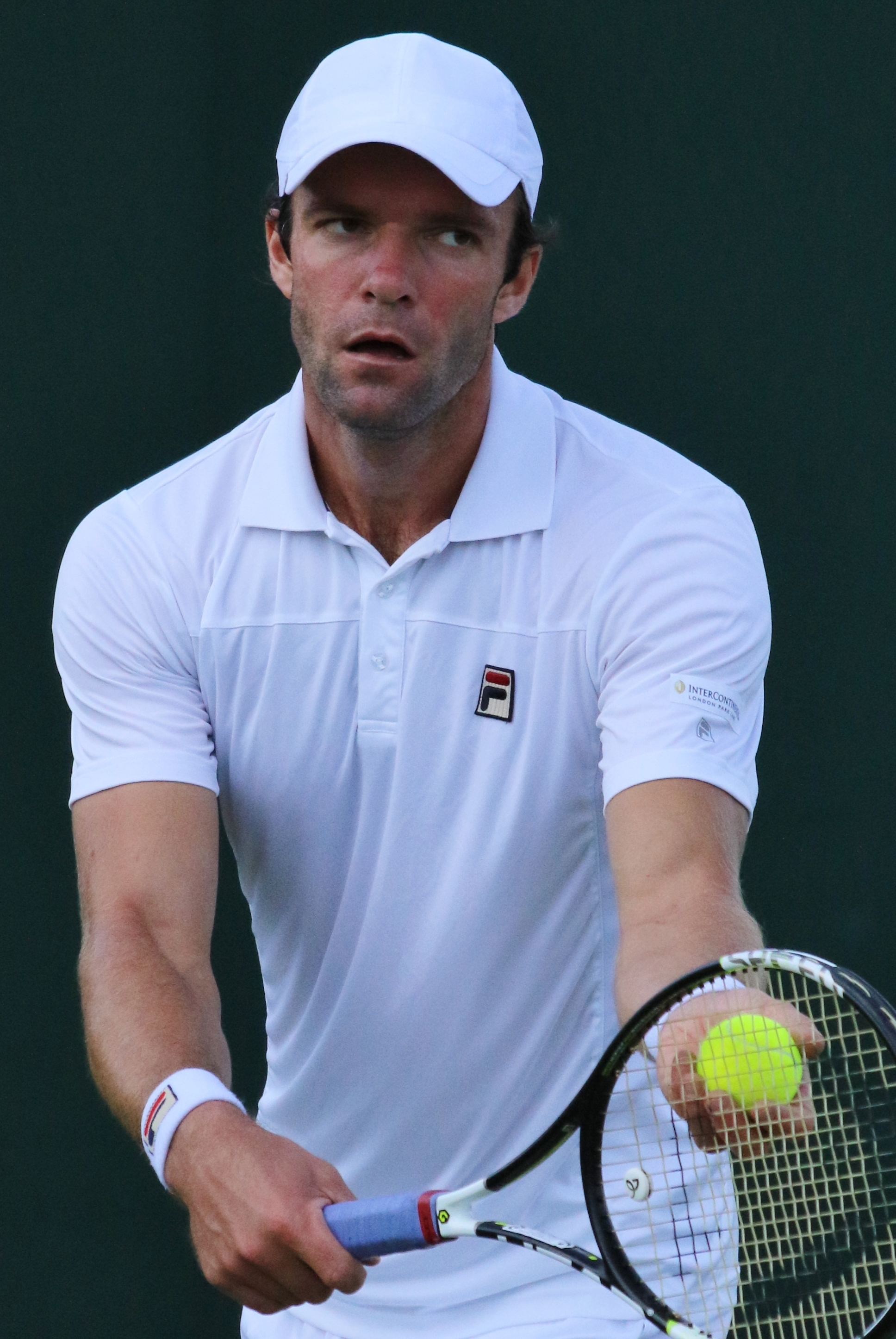 Gabashvili WM16 (2)